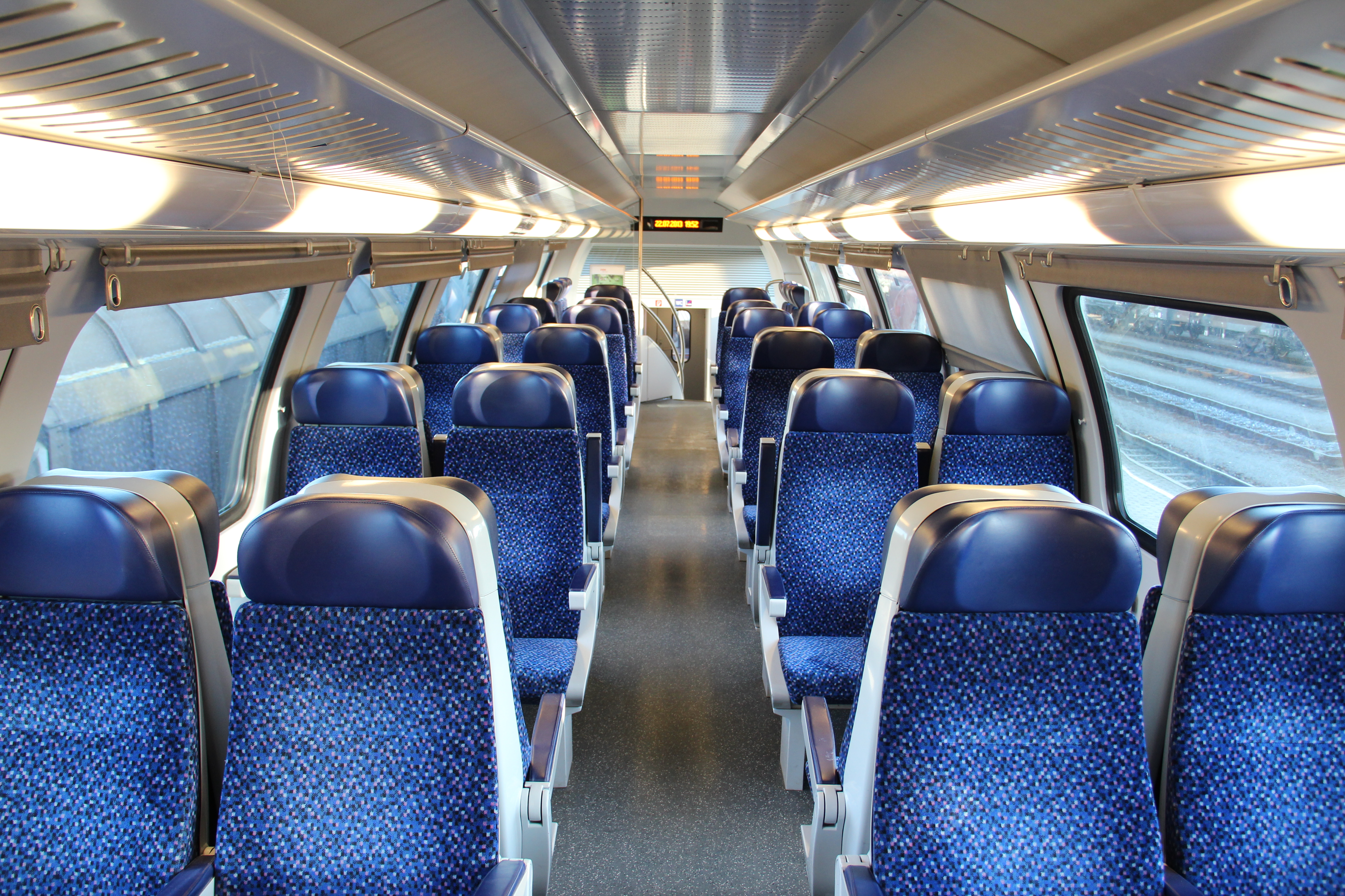 Der Innenraum (oberes Stockwerk) in einem ÖBB Doppelstockwagen der Baureihe 26-33.